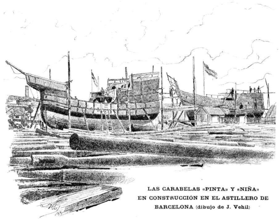 Las carabelas «Pinta» y «Niña» en construcción en el Astillero de Barcelona.